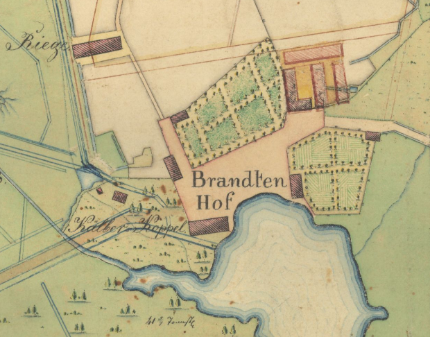 Prandi mõisakeskus 1829. aastal